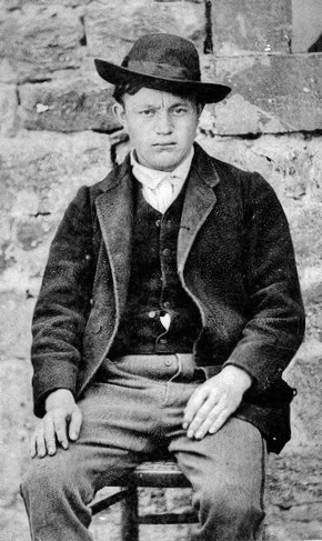 Böttchergeselle Eduard Kullmann (1853 - 1892) nach seinem Attentat am 13. Juli 1874 auf Reichskanzler Otto von Bismarck in Bad Kissingen, fotografiert vom Kissinger Fotografen Wilhelm Cronenberg